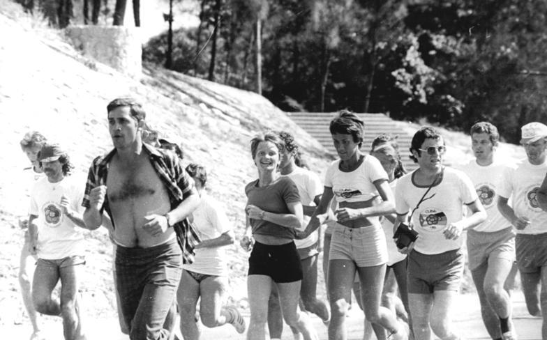 ADN-ZB-Mittelstädt-4.8.1978-cb-Kuba: Weltfestspiele-Festivalmeile. Mehrere hundert Delegierte zu den XI. Weltfestspielen liefen am 4.8.78 in Havanna die traditionelle Festivalmeile. An dem Lauf über 1 978 Meter von der Universität bis zum Platz der Revolution, beteiligten sich auch Karin Büttner-Janz (mitte) und Gunhild Hoffmeister (rechts daneben) aus der DDR, sowie weitere Sportlerpersönlichkeiten.